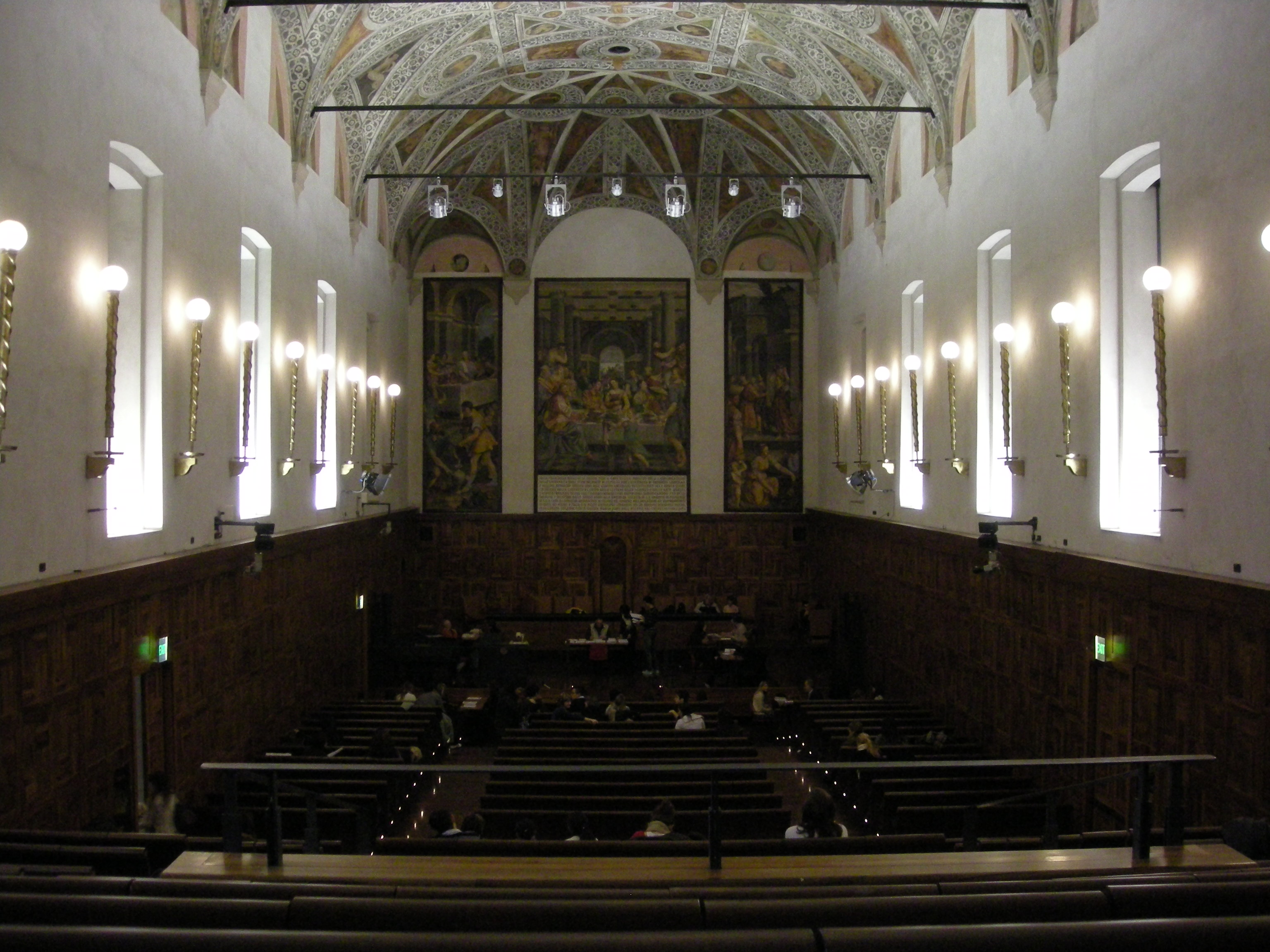 Aula magna